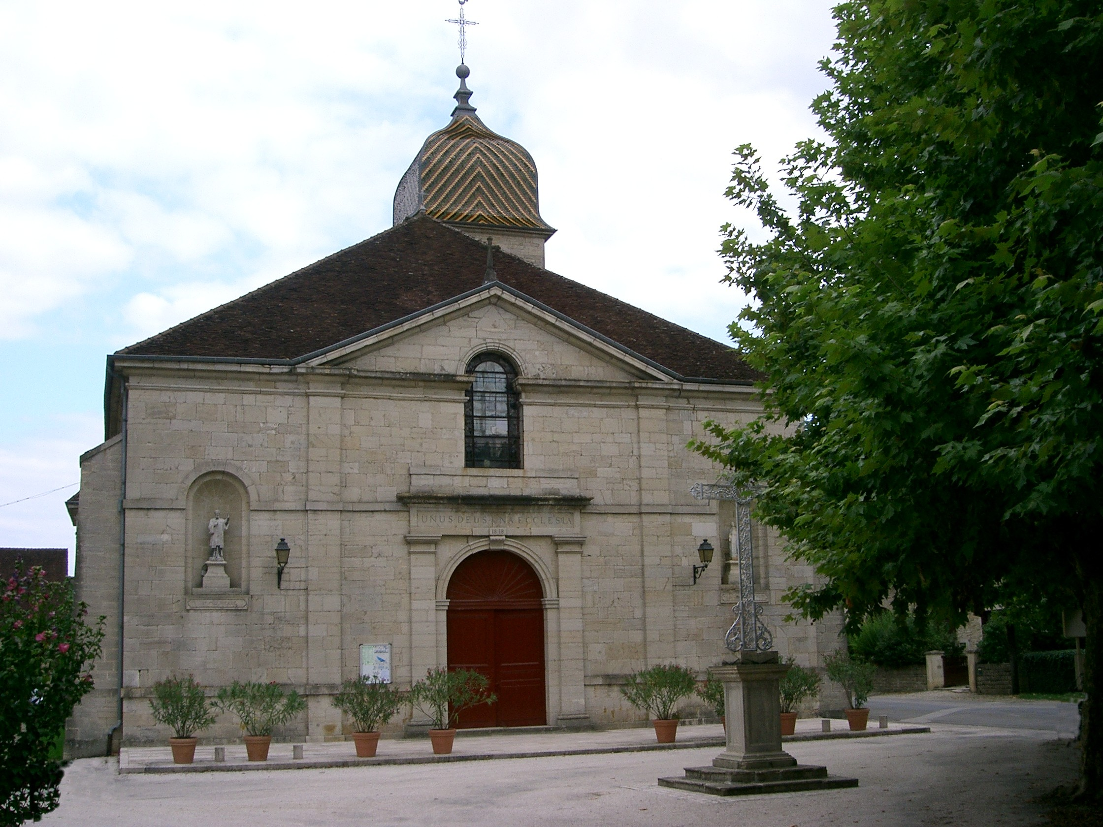 façade de l'église. Arlay - Jura (39) - France